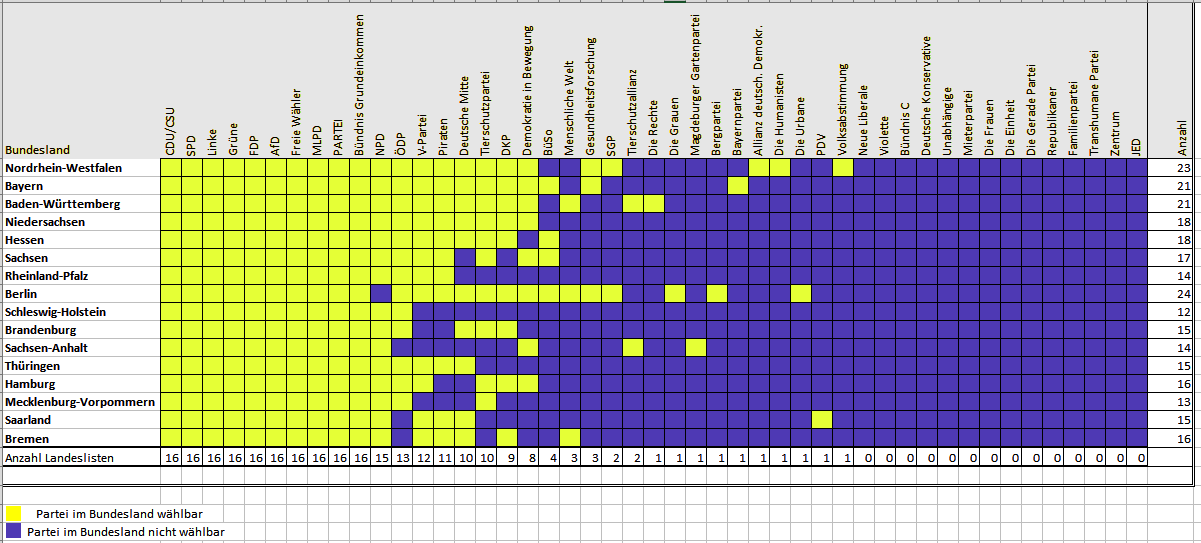 Eine Tabelle, die zeigt, welche Parteien zur Bundestagswahl 2017 in welchem Bundesland wählbar sein werden. Berücksichtigt sind auch die Parteien, die ihre Beteiligung angezeigt, aber keine Landeslisten eingereicht haben.